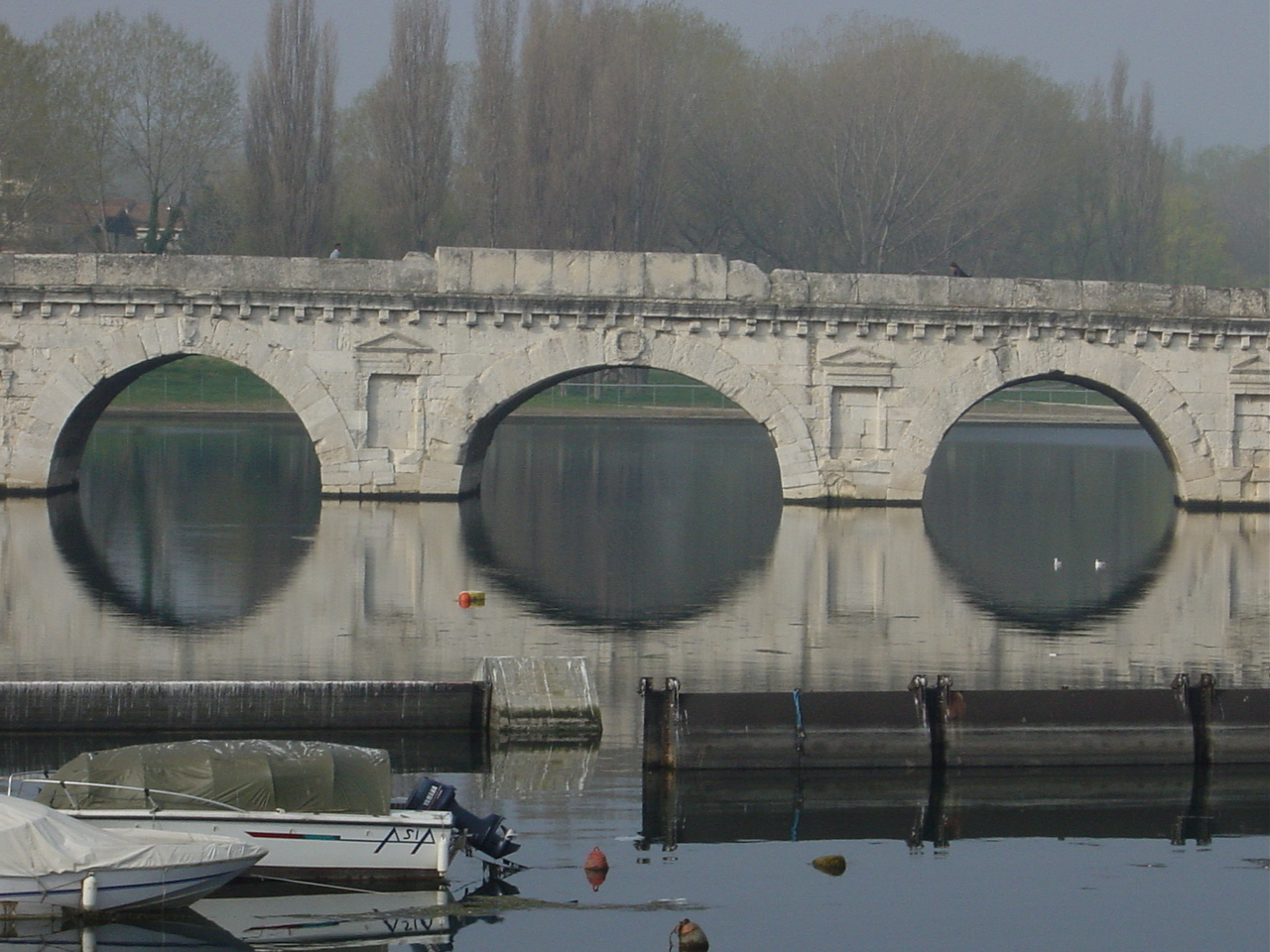 Il ponte di Tiberio di Rimini (I secolo d.C.). Foto di Giovanni Dall'Orto, aprile 2004. Tiberius bridge in Rimini (first century aD). Picture by Giovanni Dall'Orto, april 2004.